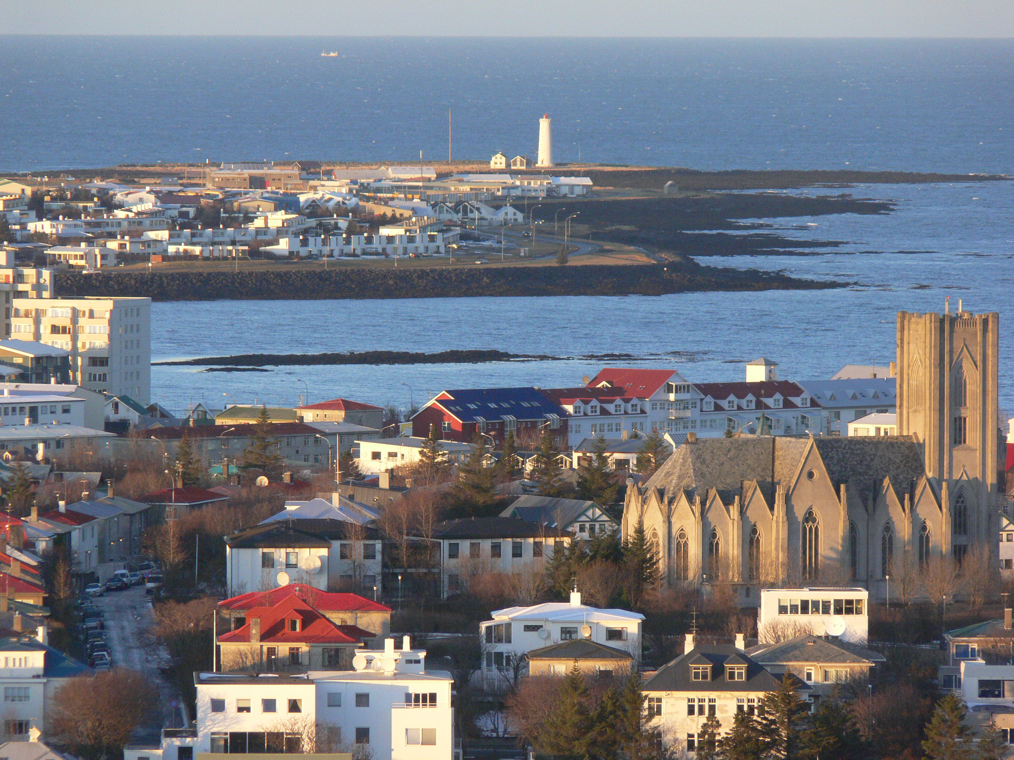 Von der Hallgrímskirche in Richtung Leuchtturm Grótta.